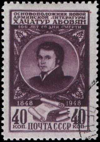 Почтовая марка СССР. 100-летие со дня смерти Х. Абовяна, 1948